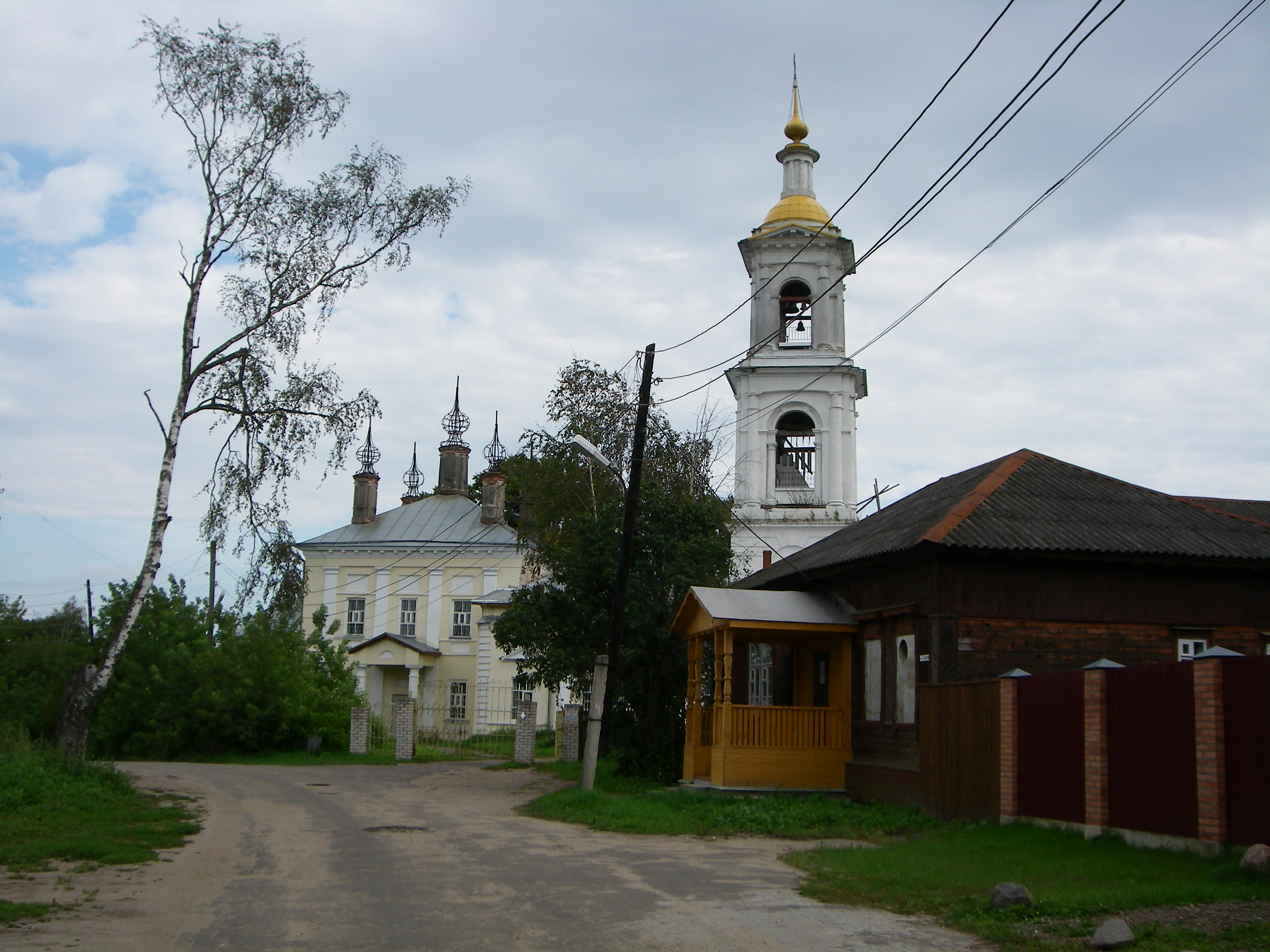 Kimri - urbo en Tverja provinco: preĝejo en malnova parto de la urbo